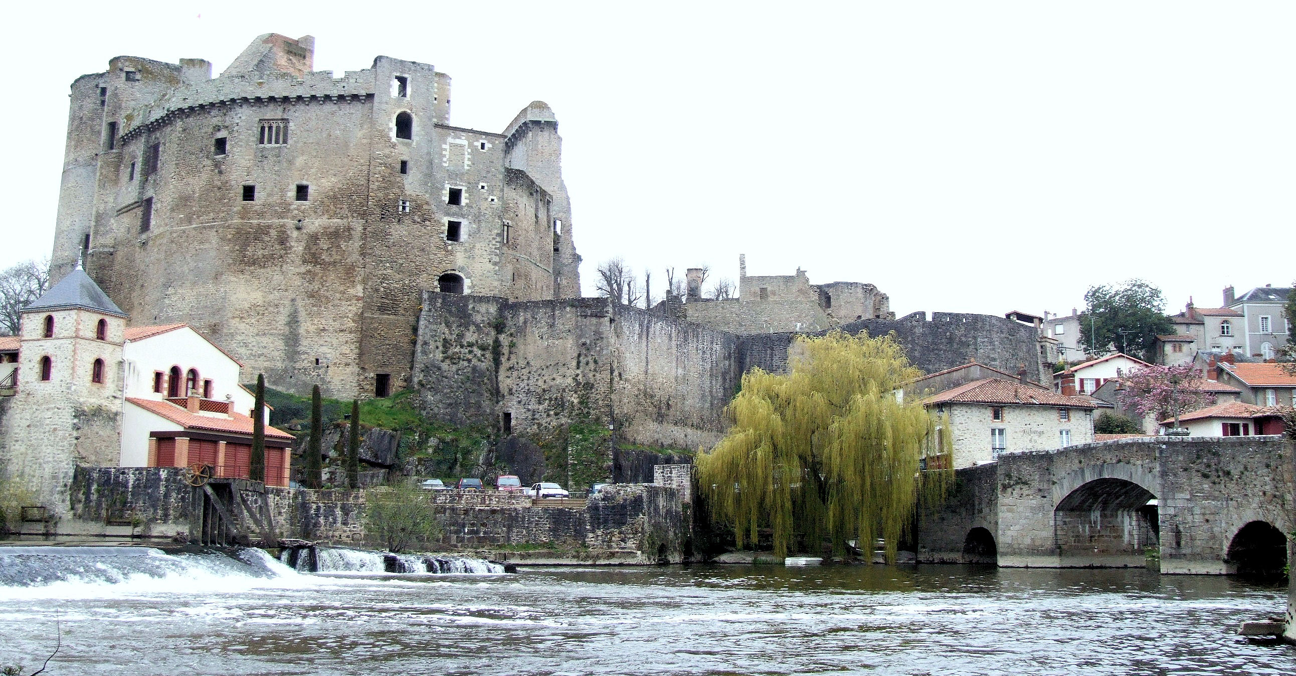 Clisson - Château et pont de la Vallée